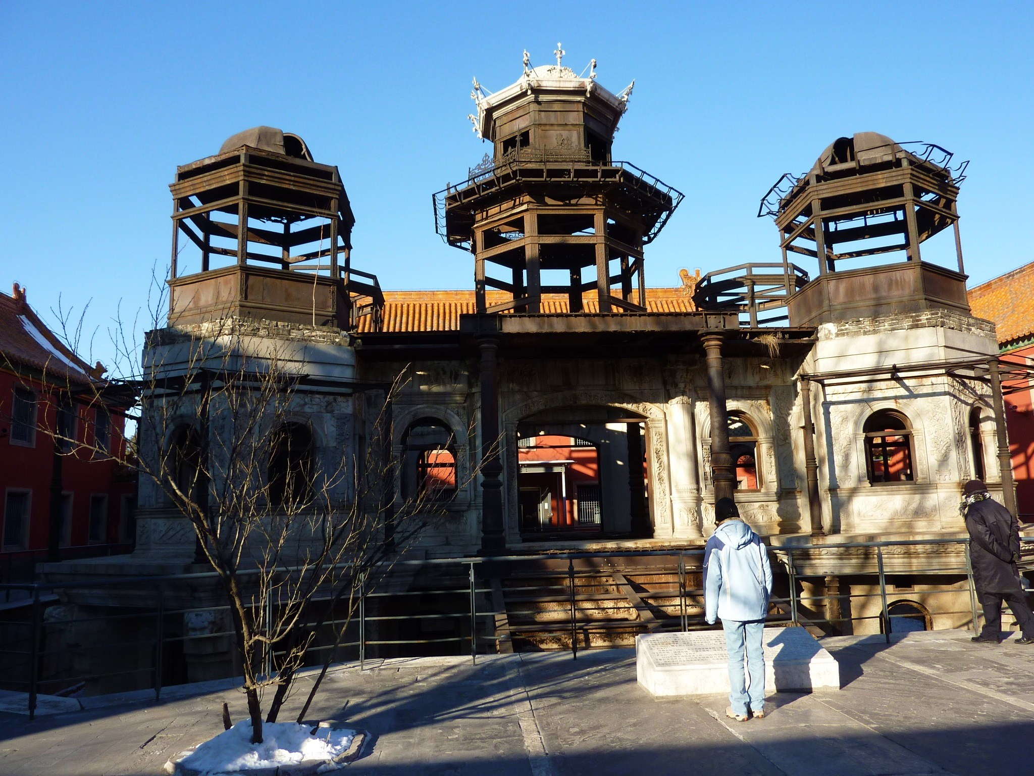 ·˙·ChinaUli2010·.· Beijing - Forbidden Town